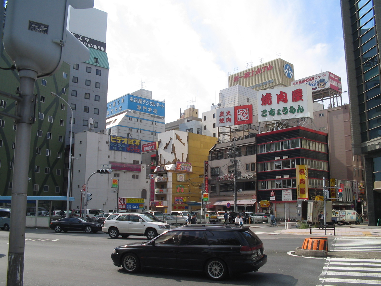 Nagoya center